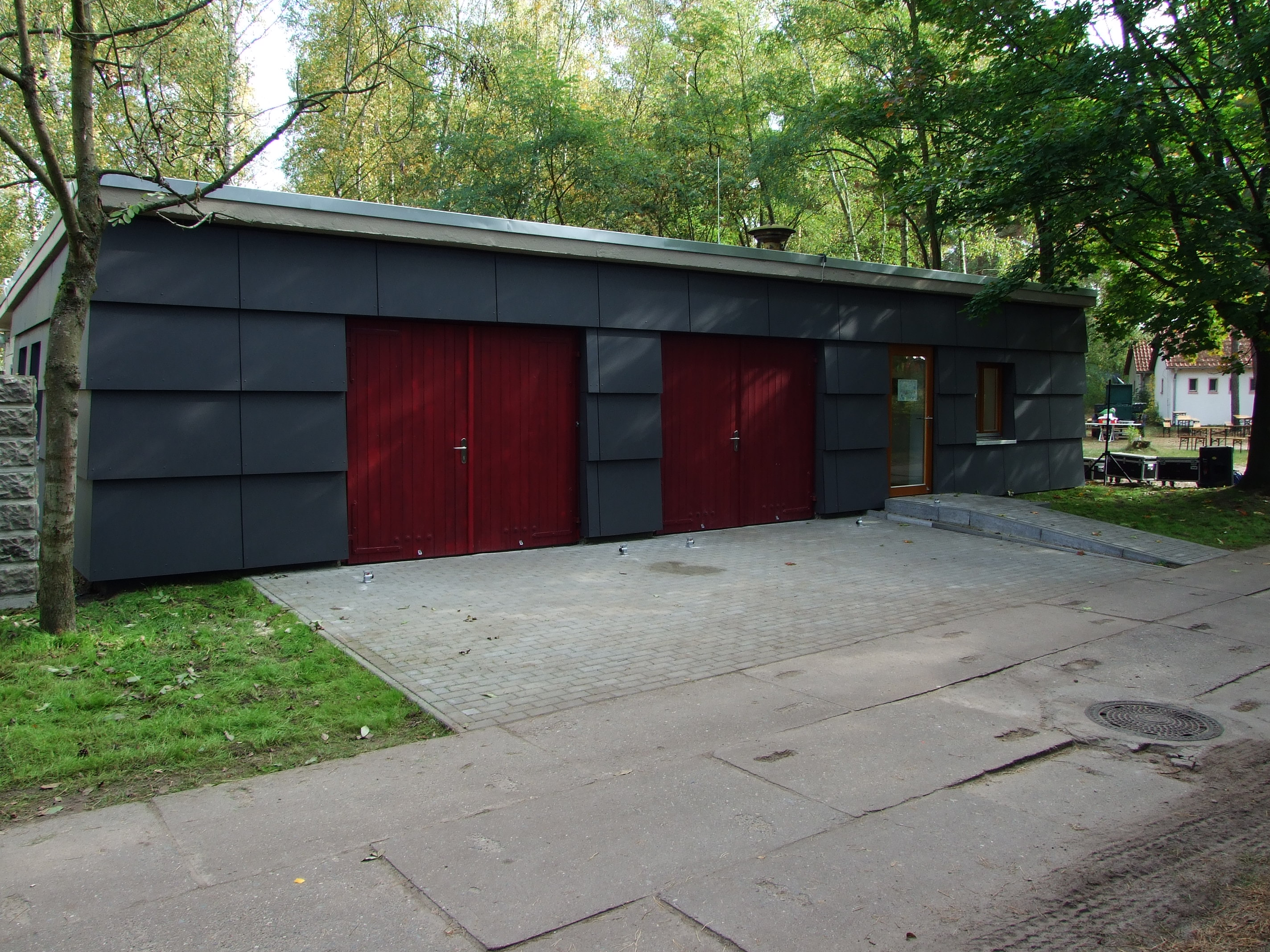 Aussenansicht der Kinderfeuerwache im Floriansdorf KiEZ Frauensee